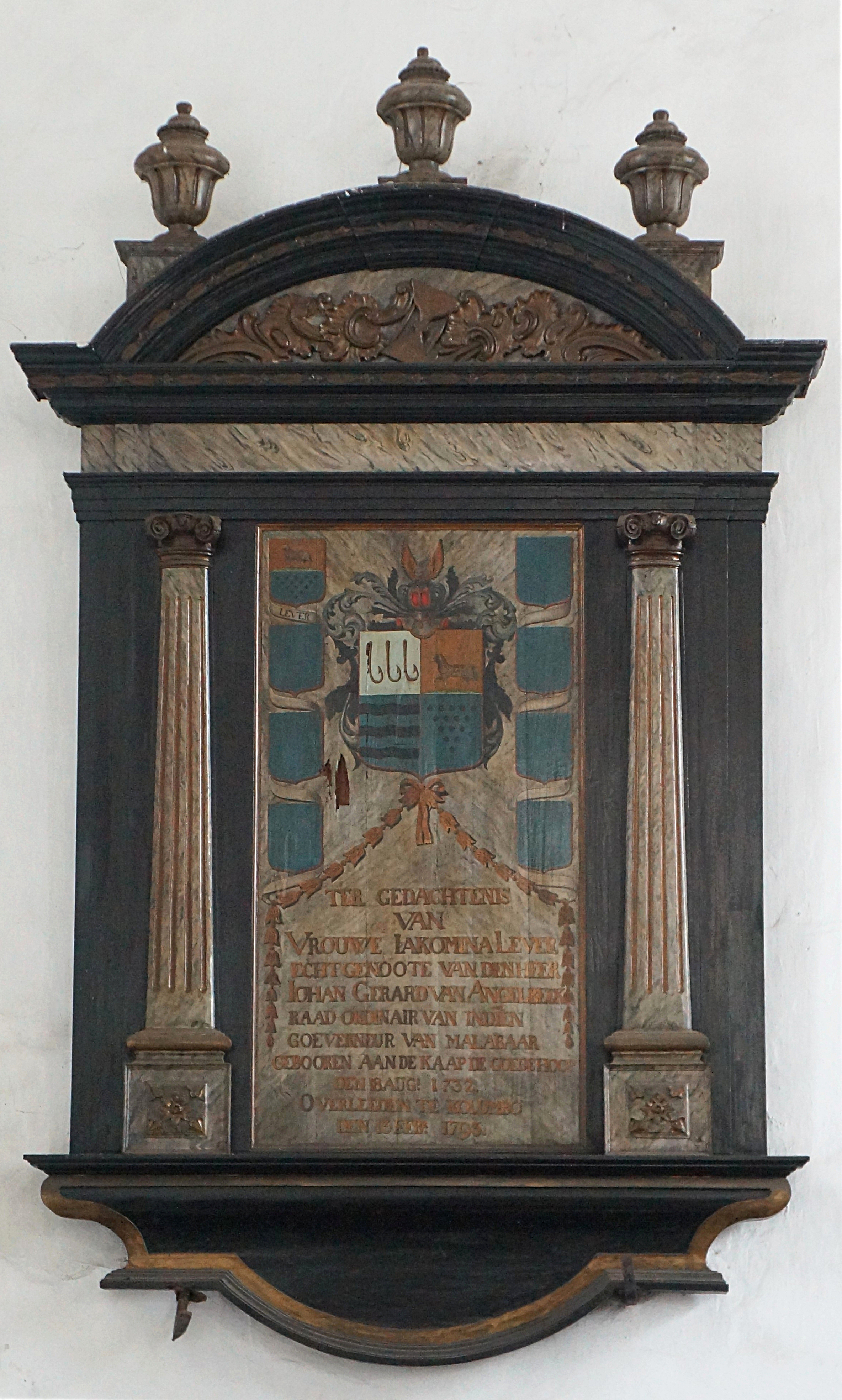 Ex voto à la mémoire de Lady Iakomina Lever épouse du gouverneur Johan Gerard van Angelbeek, dans l'église protestante Wolfendhal construite par les Hollandais en 1749., Colombo Province du Sud - Sri Lanka